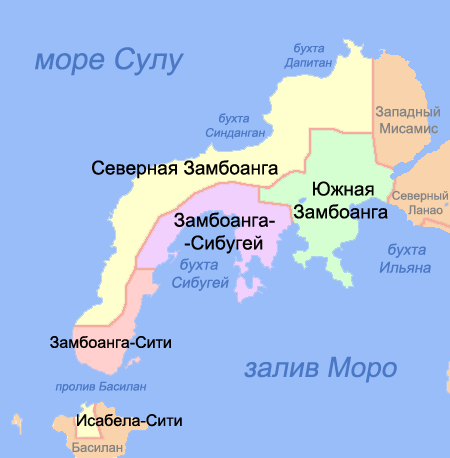 Карта провинций региона Полуостров Замбоанга (Филиппины)